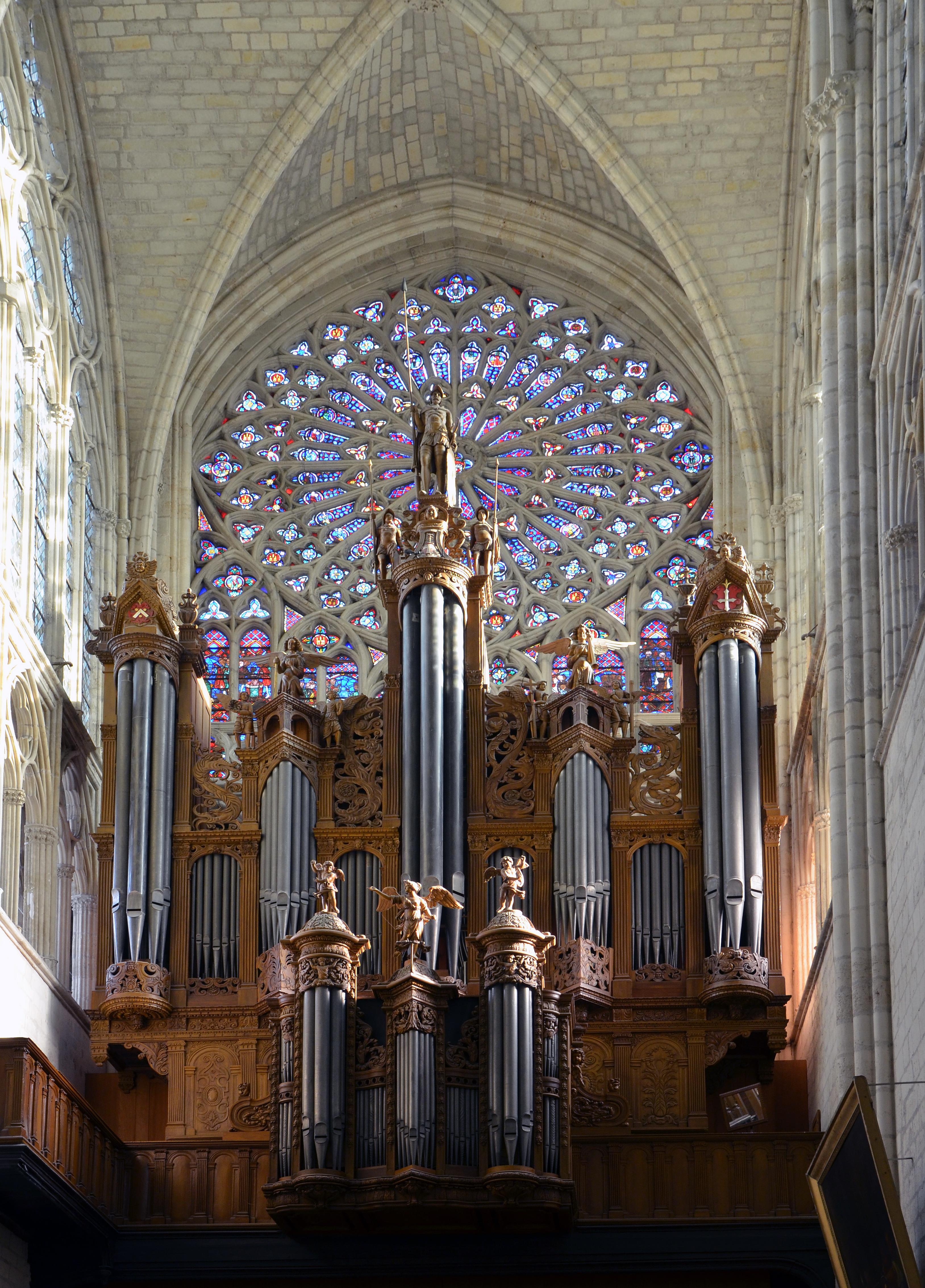 Orgue de la cathédrale St-Gatien a Tours (Indre et Loire, France). La construction du grand corps du buffet remonterait à 1521. Après avoir subi des dommages il a été réparé et amélioré en 1585 par André Delahaye compositeur et facteur d'orgue à Sens.